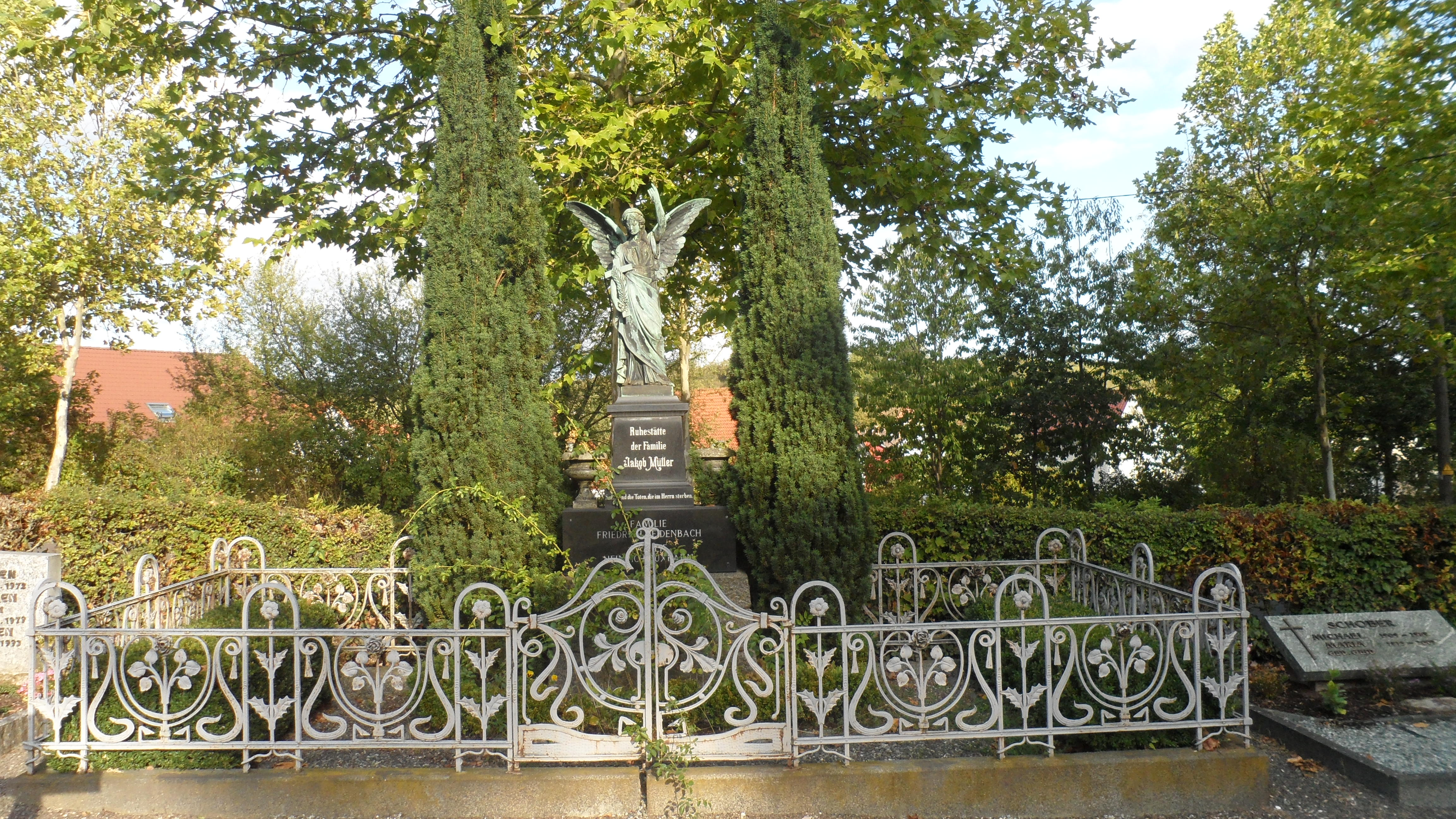 Bad Sobernheim.Eckweilerstr.,auf dem Friedhof. Grabmal J Müller,galvanoplastischer Engel,schmiedeeiserne Einfriedung.,um 1910